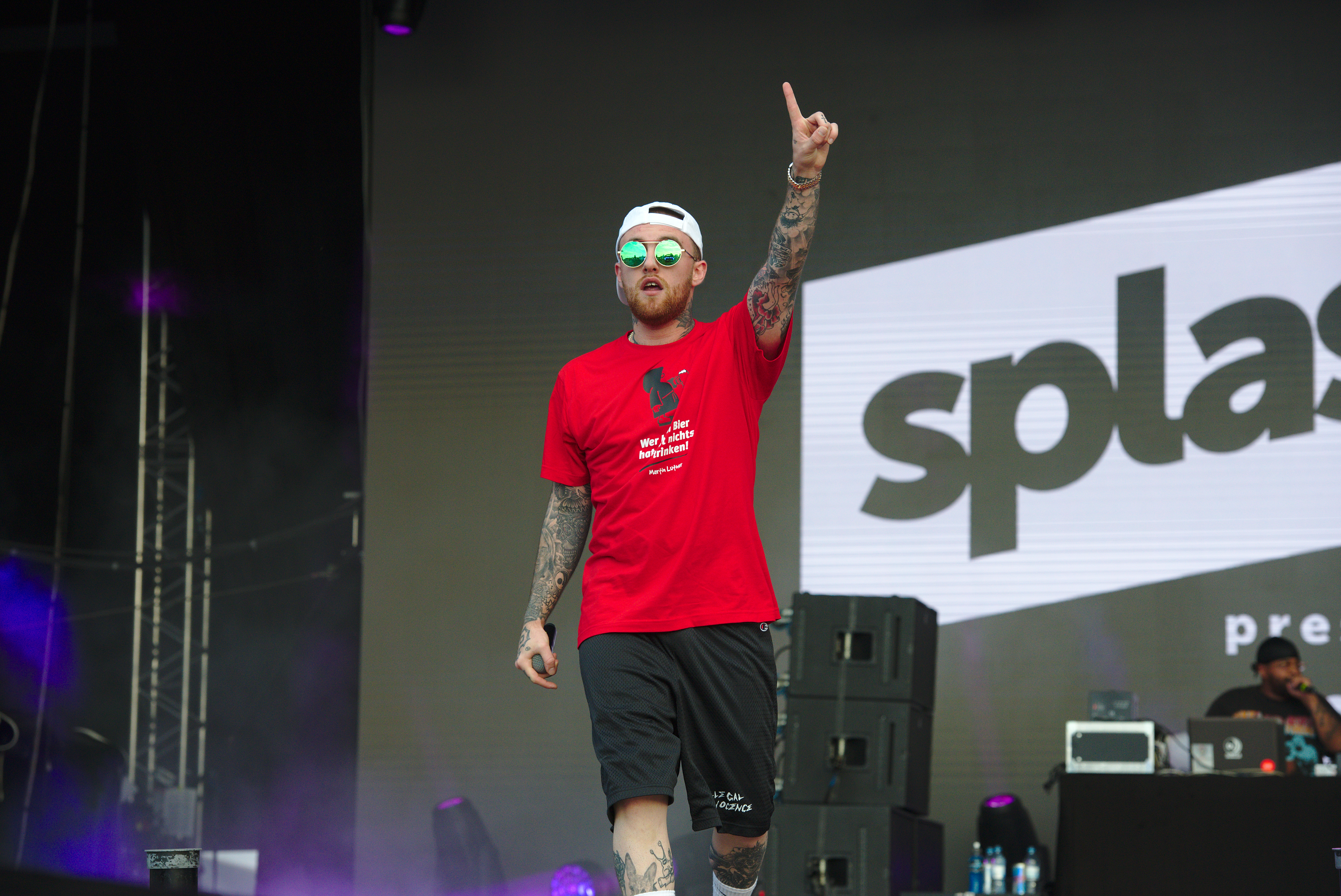 Der US-amerikanische Rapper Mac Miller beim splash! Festival 20 (2017).